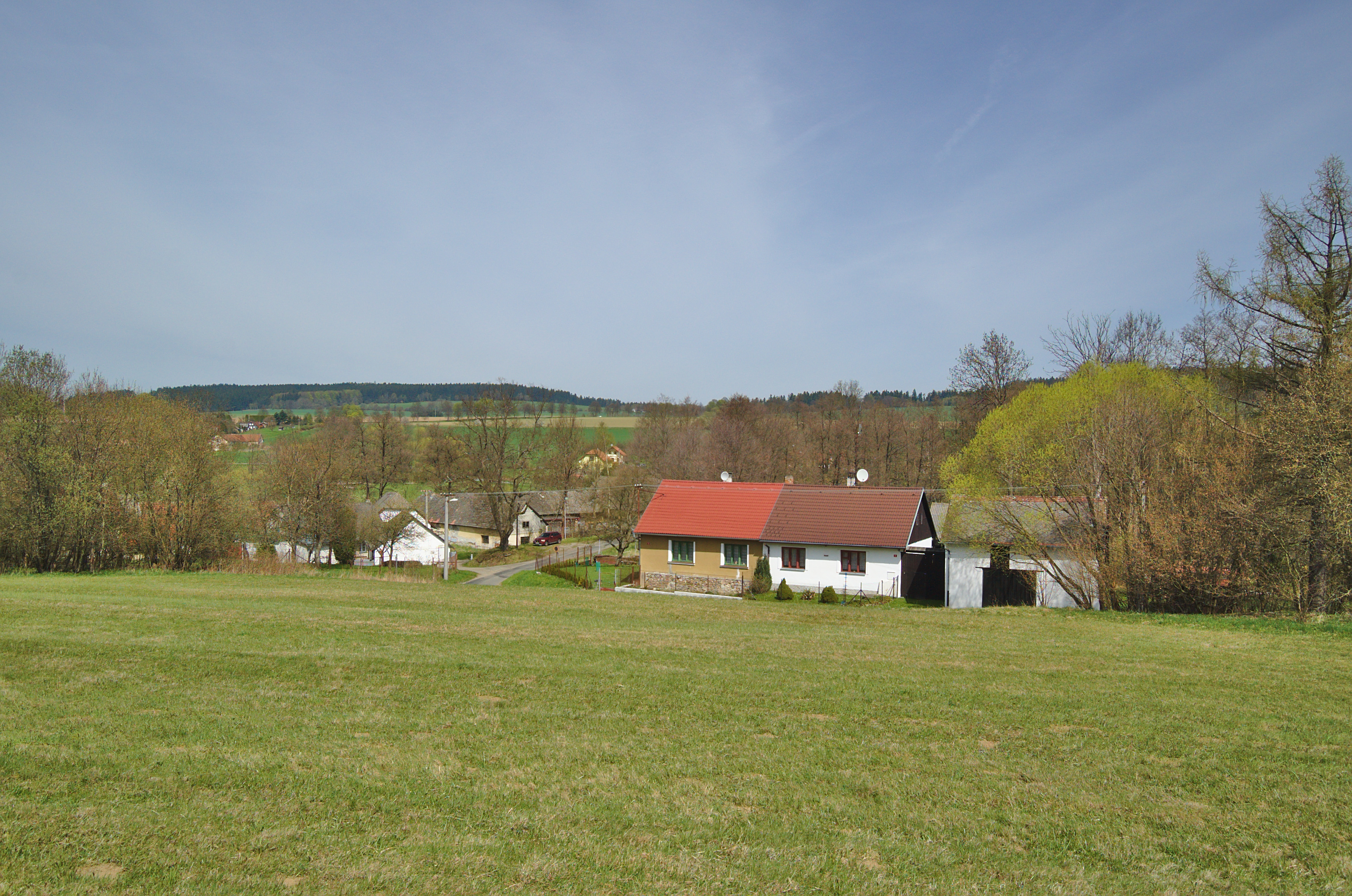 Pohled na osadu od jihu, Vackov, Černovice, okres Pelhřimov Project: Fotíme Česko